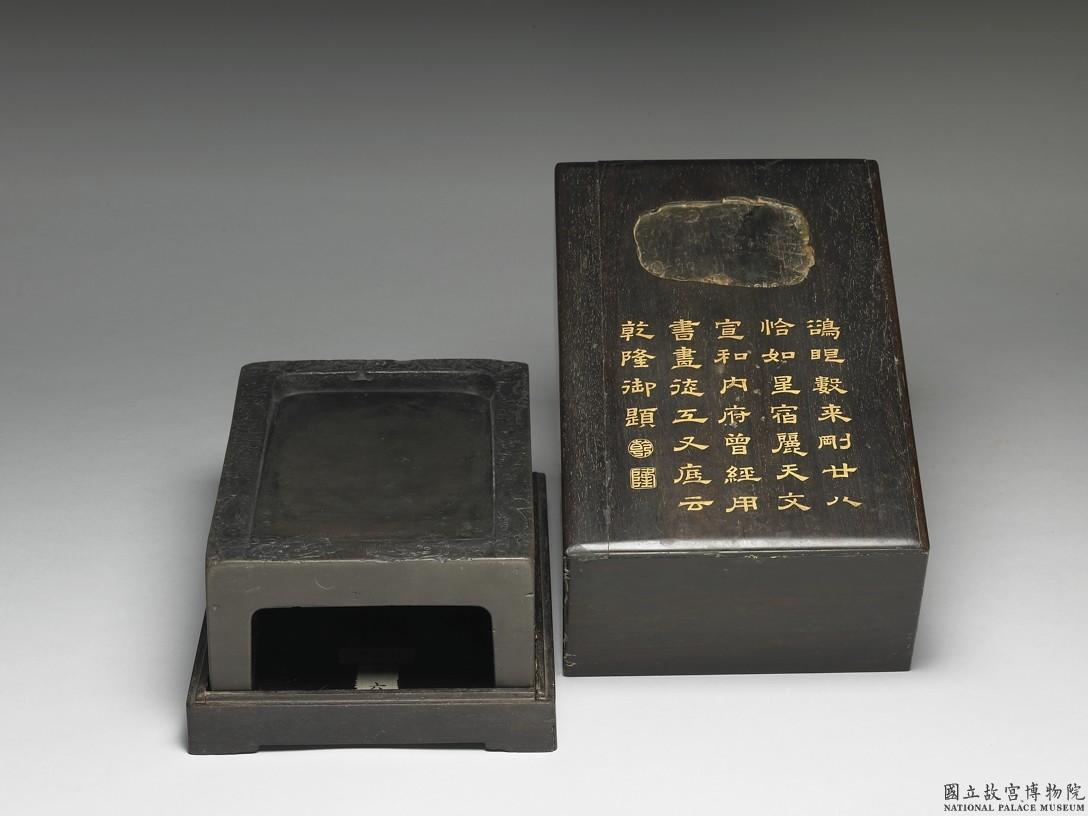 中-文-000008-N000000000 宋二十八星宿硯 高7.8公分 長寬24*14.7公分 清 西元1782年